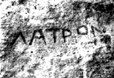 Inscription rupestre de l'oppidum du Castellan (today's location?)